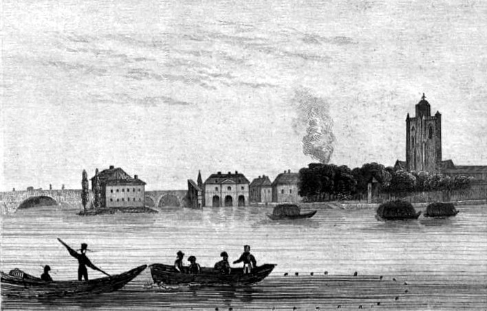 « Nogent-sur-Seine » Image en provenance du livre : Eusèbe Girault de Saint-Fargeau, Guide pittoresque du voyageur en France, contenant la statistique et la description complète des quatre-vingt-six départements, orné de 740 vignettes et portraits gravés sur acier, de quatre-vingt-six cartes de départements et d'une grande carte routière de la France, par une Société de gens de lettres, de géographes et d'artistes, Paris, F. Didot frères, 1838, 6 volumes in-8° (BNF : 8-L25- 46). Volume III Route de Paris à Nice traversant les départements de l'Isère, des Hautes-Alpes, des Basses-Alpes et du Var. auteurs dessins : Rauch (ou autre) auteurs gravures : Skelton fils, Schroeder, Bishop (ou autre)